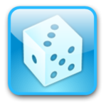 Icon